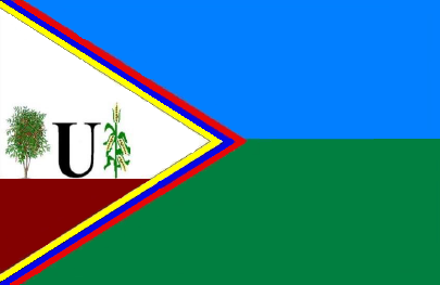 Bandera del municipio Urdaneta. Estado Trujillo. Venezuela